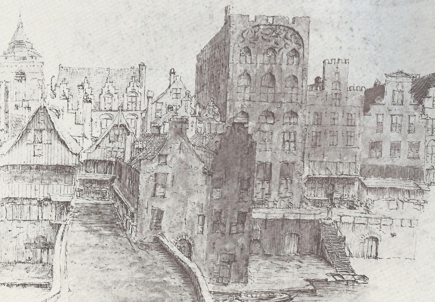 Gezicht op de zuidzijde van de Oudegracht en een gedeelte van de Snippenvlucht. Herkenbaar zijn vlnr de huizen Leeuwenberg, Valkendaal, Moerendaal en Groot Groenewoude. Op de voorgrond de Bezembrug Gewassen tekening in sepia en waterverf, anoniem, ca. 1660